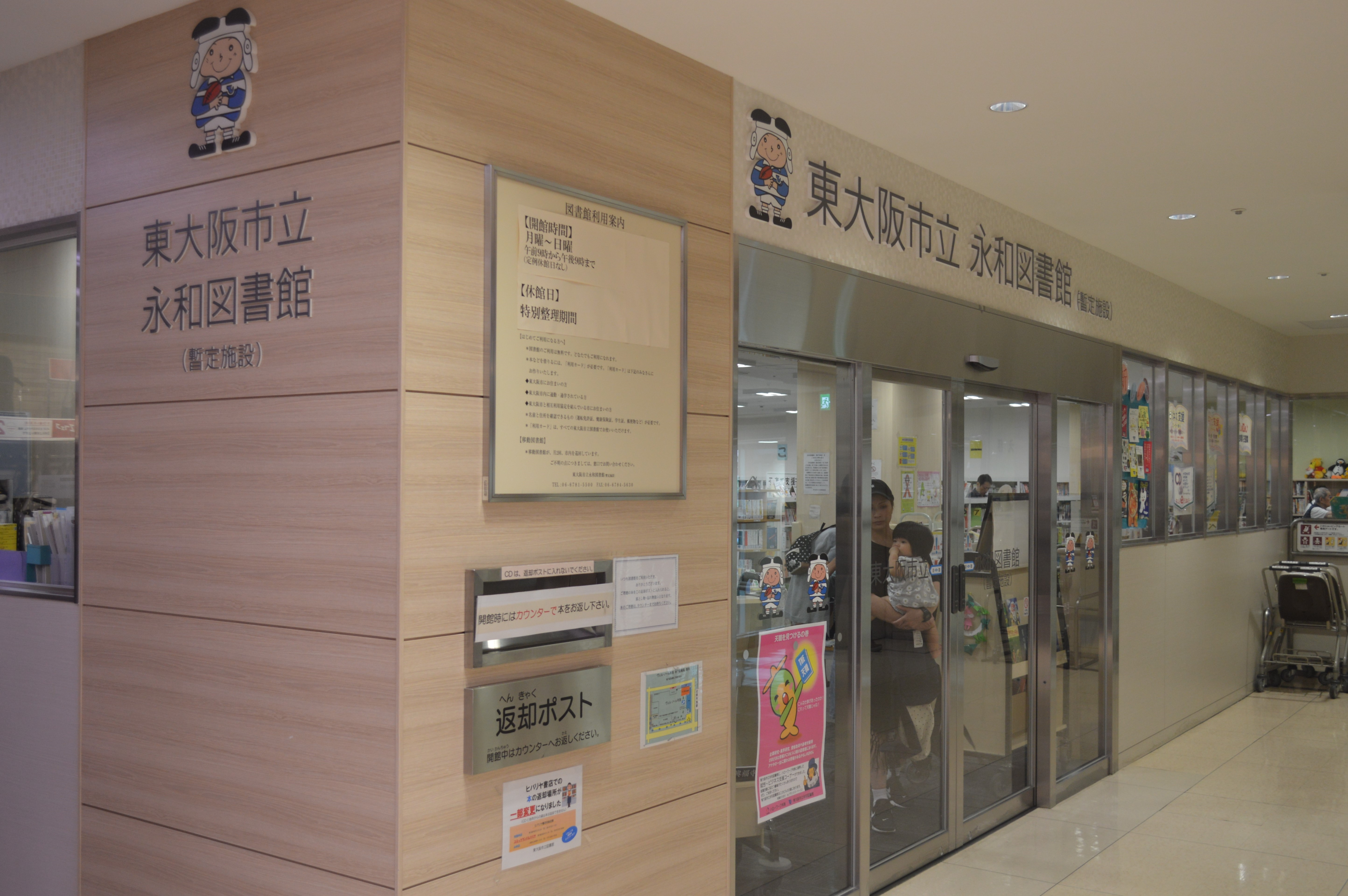 大阪府東大阪市のヴェルノール布施にある東大阪市立永和図書館（暫定施設）。